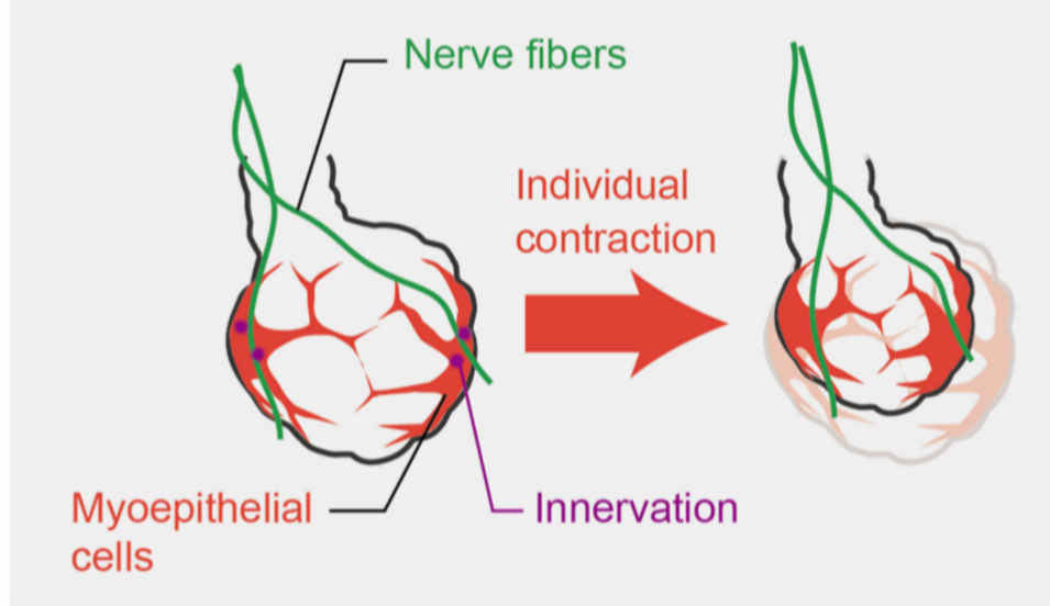 Acino. Células mioepiteliales en rojo. Terminaciones nerviosas en verde.